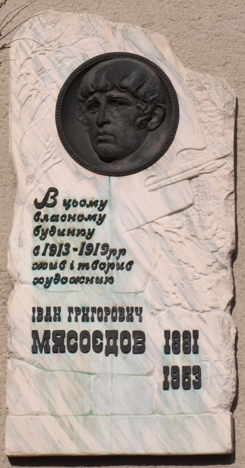 Мясоєдов Іван Григорович (меморіальна дошка у Полтаві)